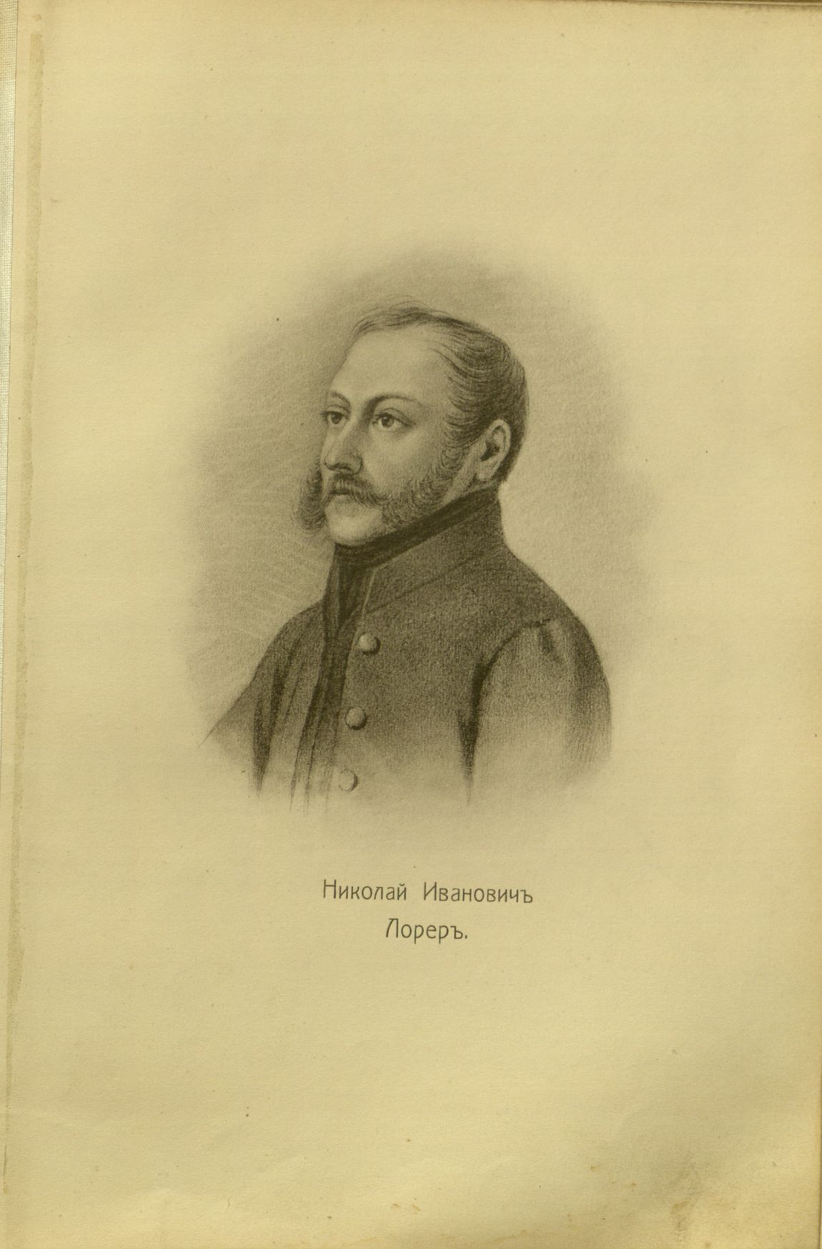 Головачев, П. М. Декабристы : 86 портретов, вид Петровского завода и 2 бытовых рисунка того времени. - М., [1906] Лорер, Николай Иванович